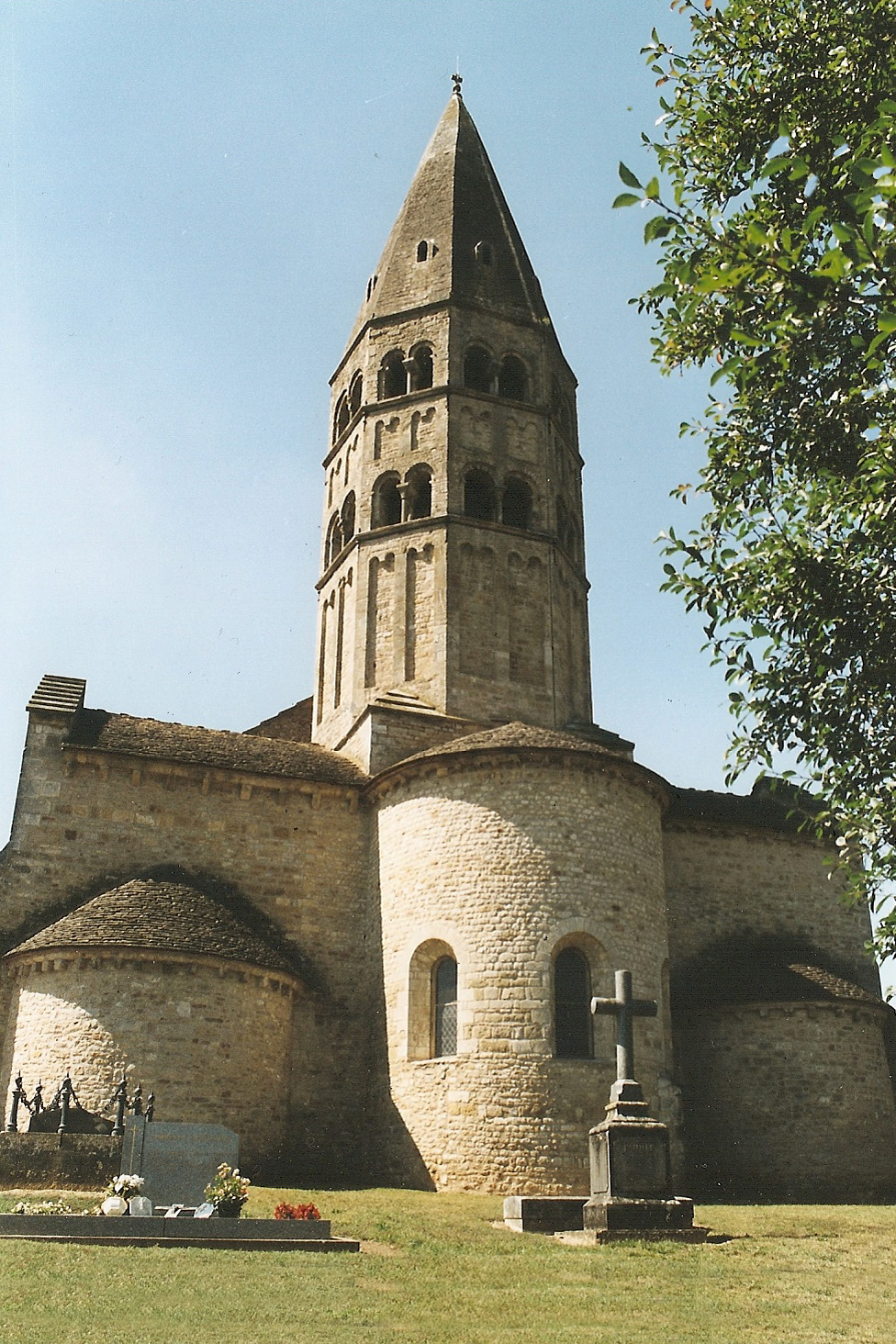 St.-André-de-Bâgé, Chorhaupt von Osten